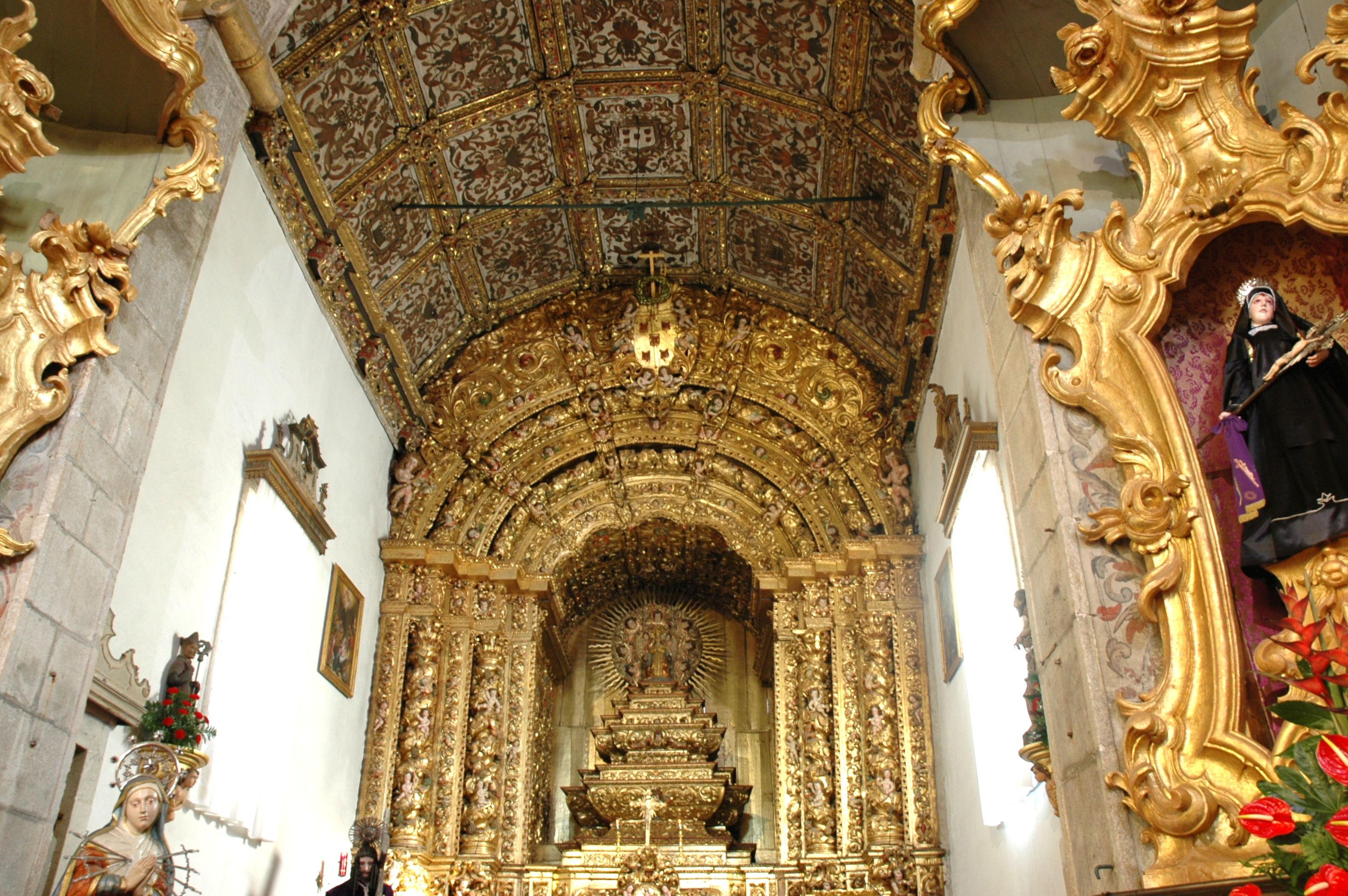 Caminha - Interior de la Capela da Misericórdia